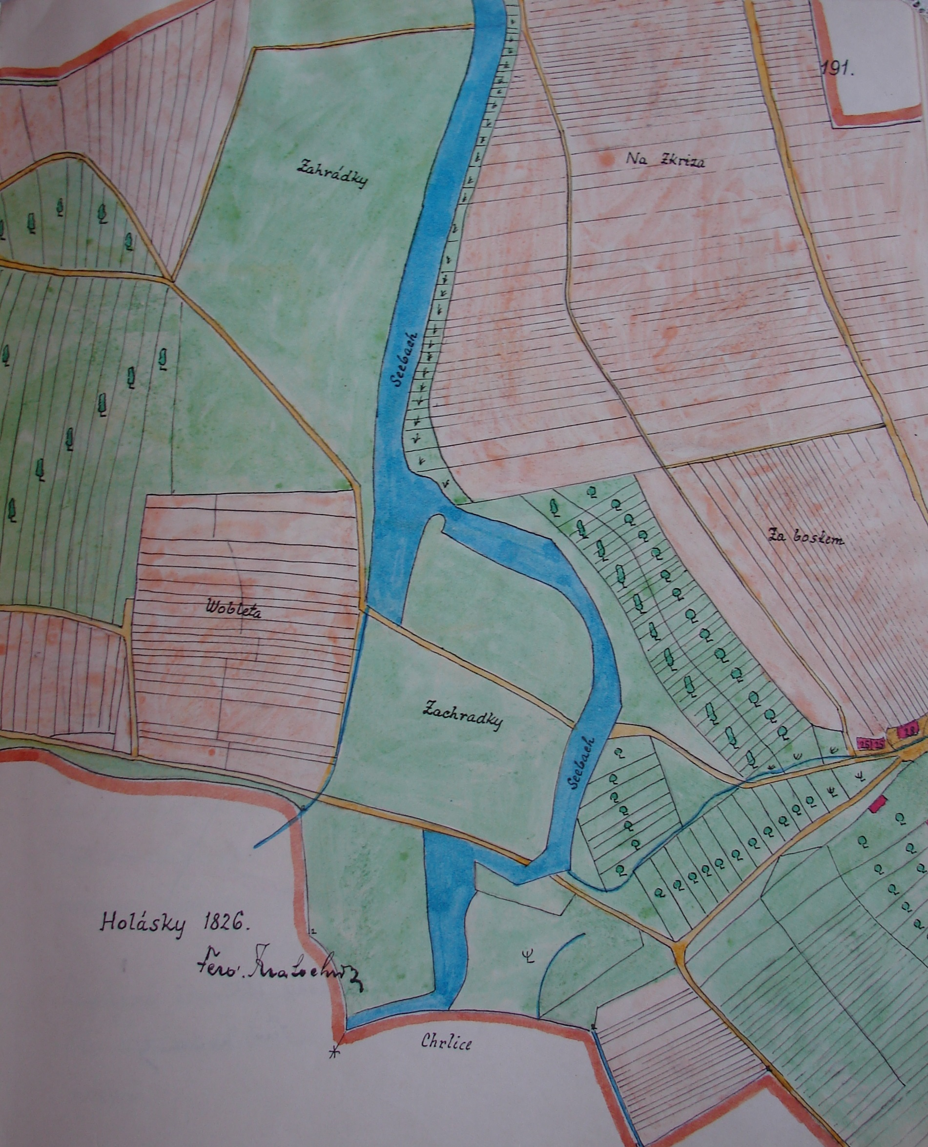 Holásecká jezera, dnes přírodní památka, jak ji zaznamenal holásecký kronikář. Okres Brno-město, Česká republika.